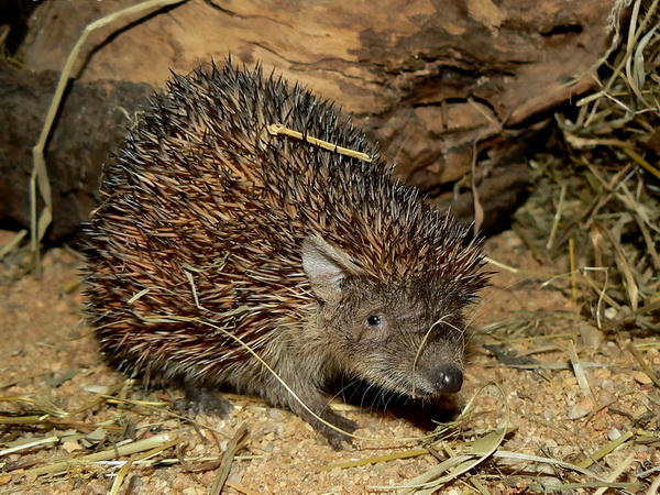 Малый ежиный, иглистый, тенрек (Echinops telfairi), Пльзенский зоопарк (Zoological and Botanical Garden Plzen), февраль 2011 года